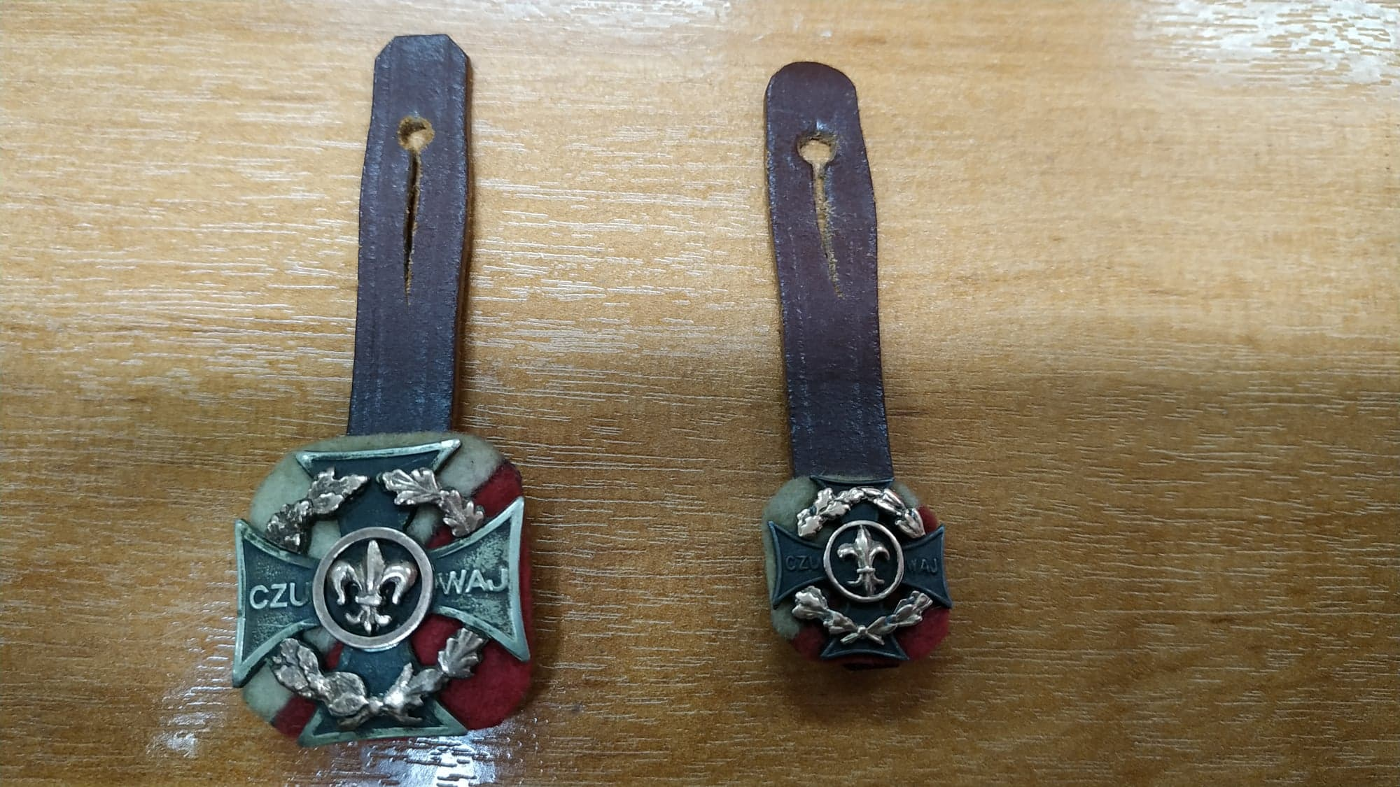 Krzyż Harcerski - harcerz Rzeczypospolitej (wraz z miniaturką)